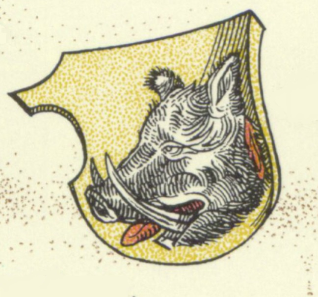 Páni ze Šelmberka - erb